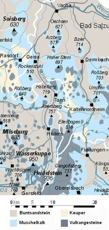 Geologische Karte von Ulstertals vom Heidelstein über Hilders, Tann und Geisa bis Vacha im Norden; rechts davon die Lange Rhön, die nach Norden in die Auersberger Kuppenrhön übergeht, rechts davon das Feldatal